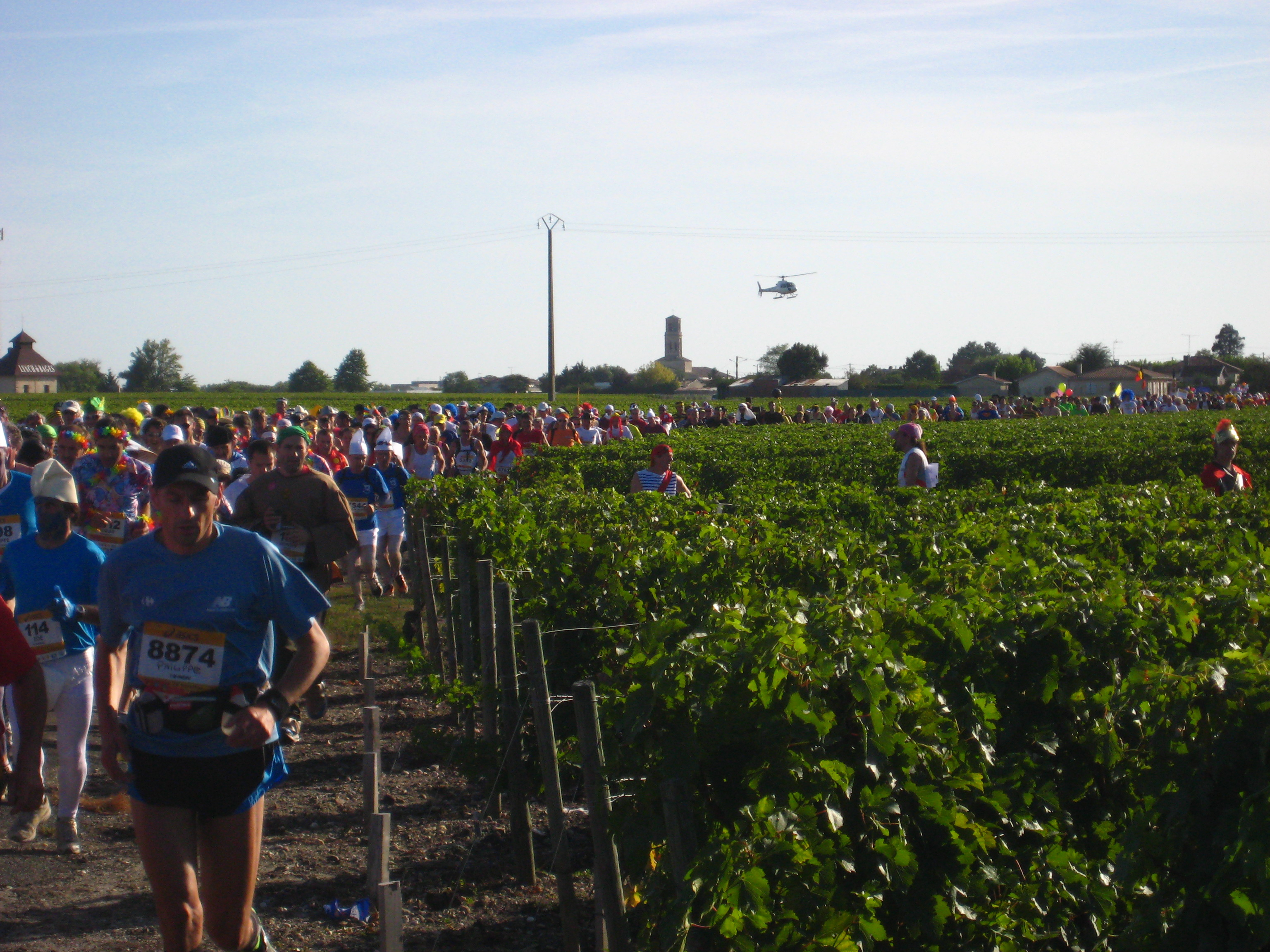 Marathon du Medoc